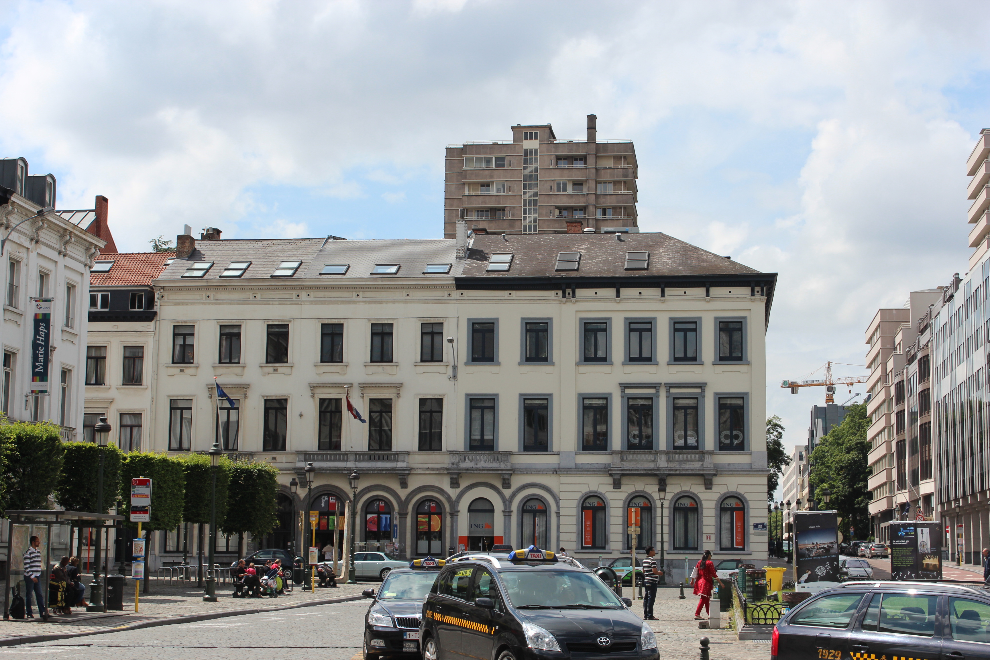 Ensemble néo-classique Place Luxembourg - neo-classisicistisch gebouwen Luxemburgplein Ixelles-Elsene